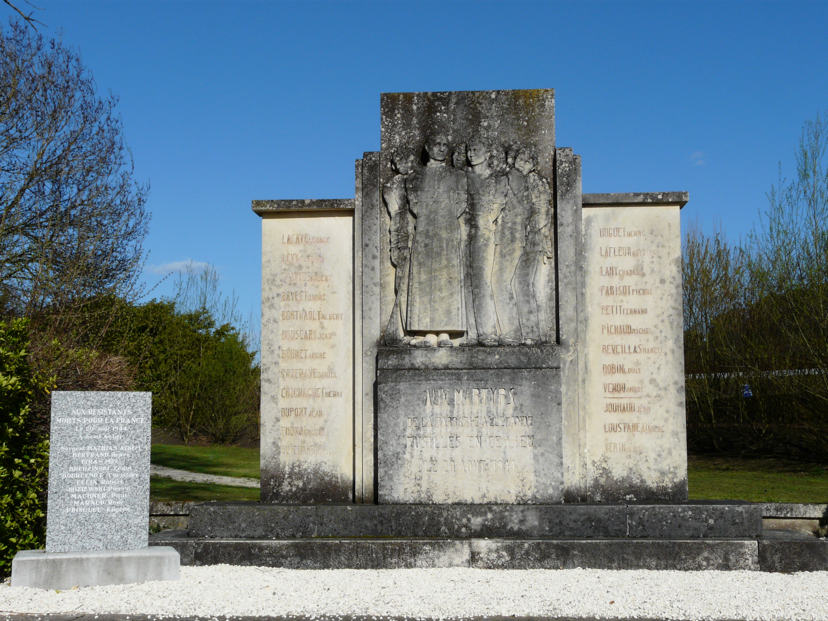 Le mémorial des fusillés du 20 août 1944 et à gauche, le mémorial des résistants morts ce jour-là, Saint-Astier, Dordogne, France